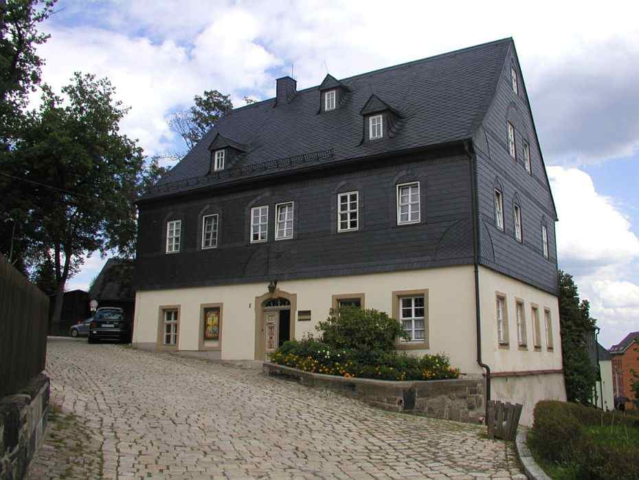 Portal am Pfarrhaus in Lauter